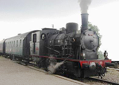 Locomotive Krupp : 030 T 741, de 1931, du Chemin de Fer de Vigy à Hombourg Budange en Moselle à travers la verdoyante vallée de la Canner